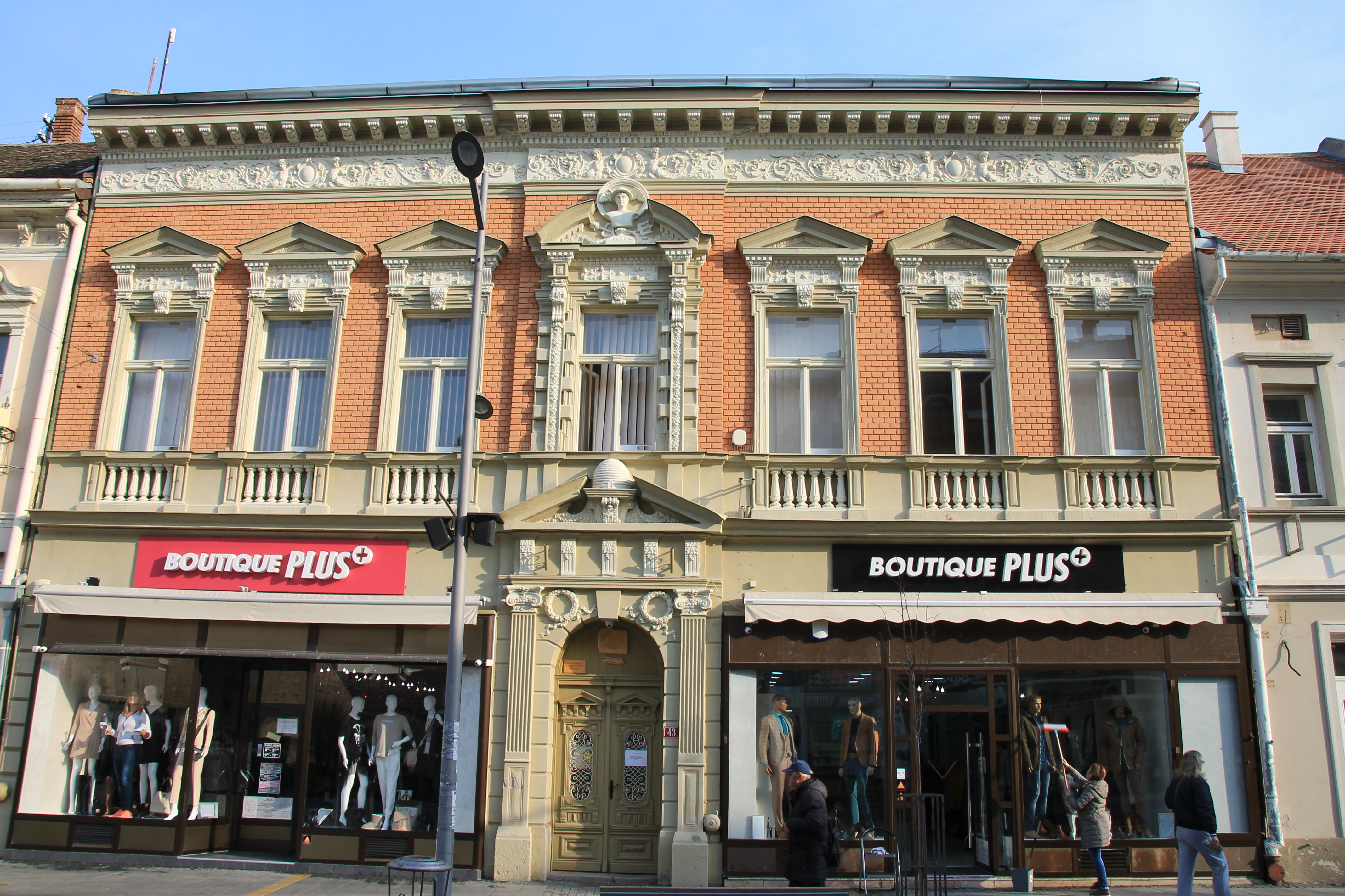 Staro jezgro Zrenjanina